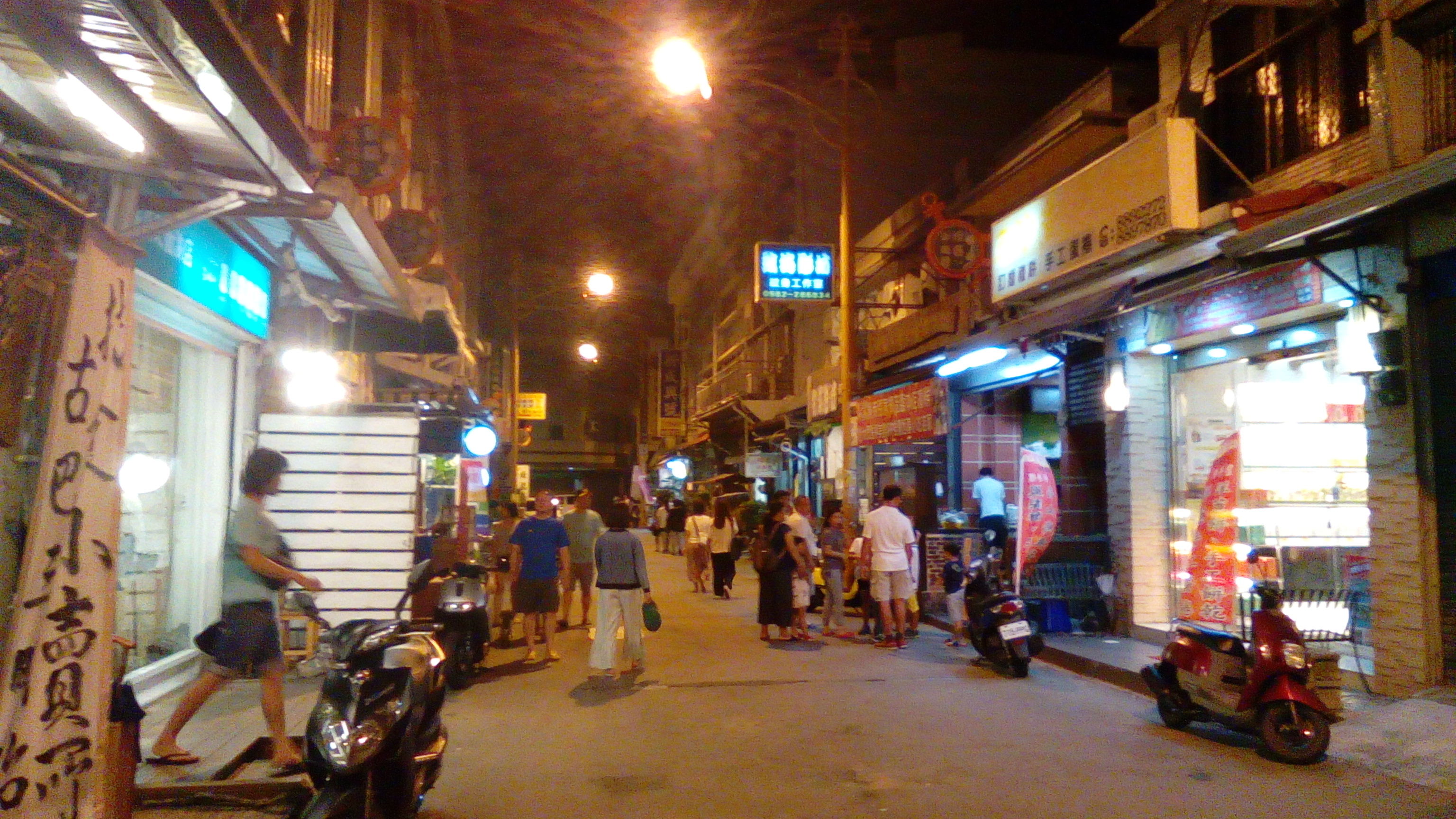 恆春鎮中山路